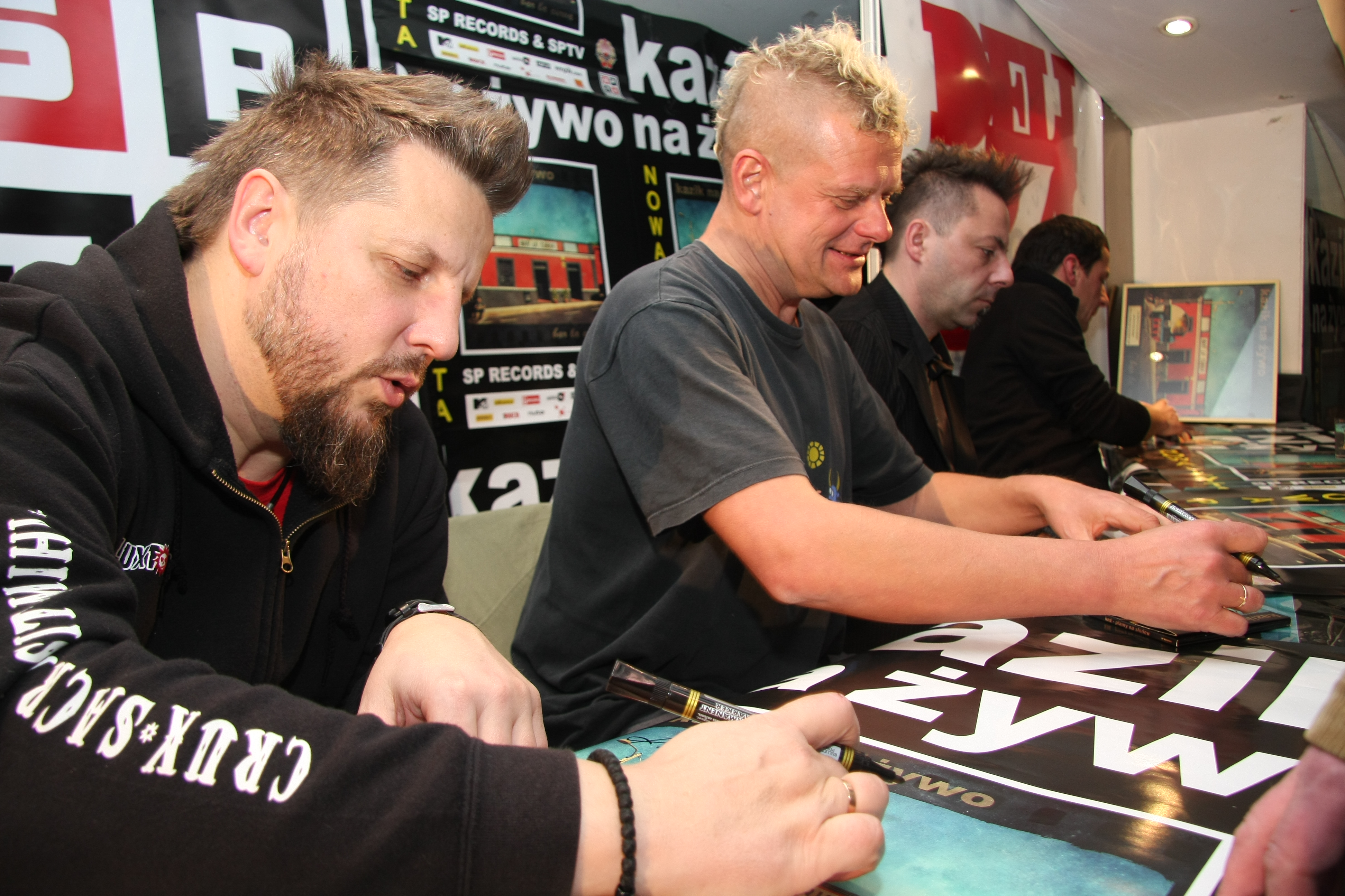 Robert "Litza" Friedrich i Kazik w czasie podpisywania płyty Bar La Curva / Plamy na słońcu zespołu Kazik na Żywo 5 grudnia 2011 roku w warszawaskim Teatrze Rozmaitości